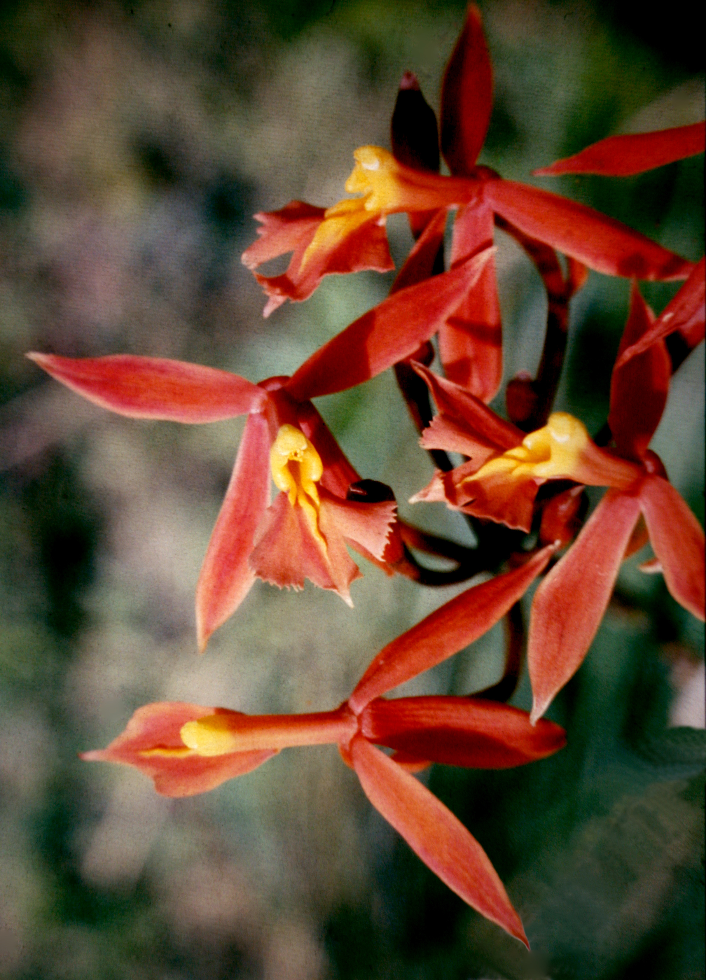 Epidendrum macrocarpum, Suriname. Syn: Epidendrum schomburgkii